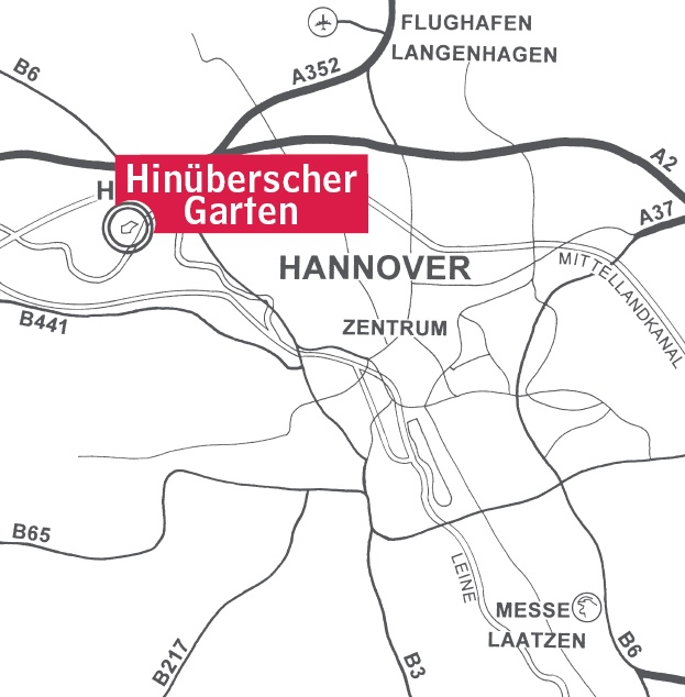 Lagekarte des Hinüberschen Gartens